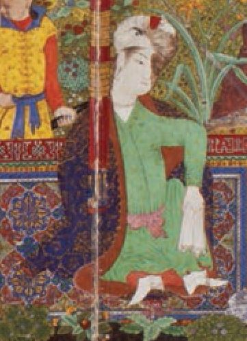 Портрет Ягуб-бека с придворными. Альбом Мехмета Завоевателя